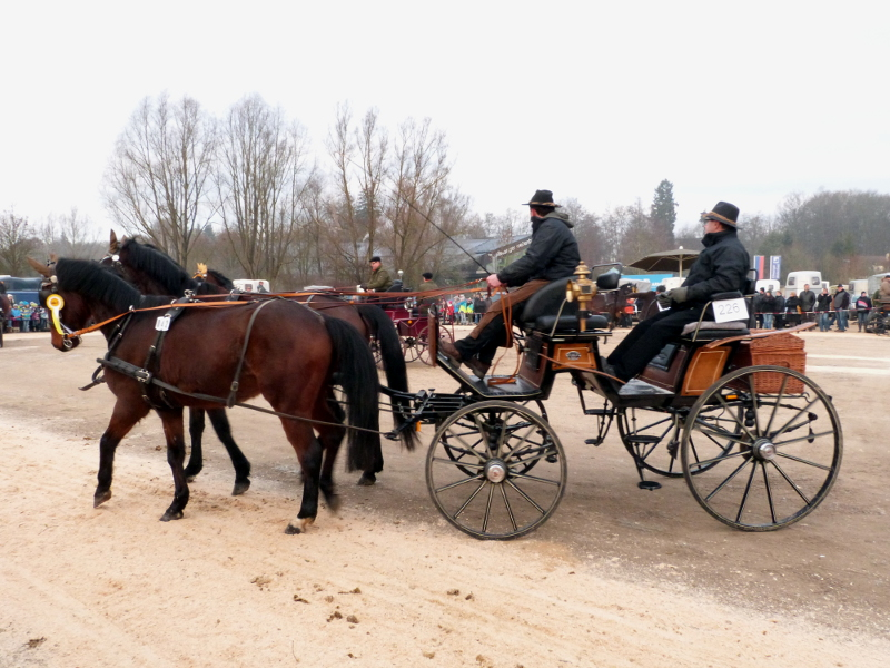 Ausfahrt der Gespanne zur Prämierung beim Kalten Markt in Ellwangen 2014